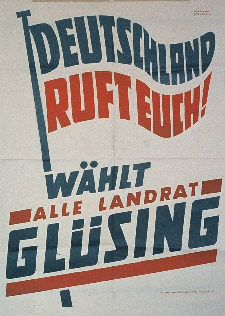 Deutschland ruft Euch! Wählt alle Landrat Glüsing Plakatart: Kandidaten-/Personenplakat ohne Porträt Drucker_Druckart_Druckort: Gebr. Lorenzen, Heide Objekt-Signatur: 10-001: 93 Bestand: Plakate zu Bundestagswahlen (10-001) GliederungBestand10-18: Plakate zu Bundestagswahlen (10-001) » Die 1. Bundestagswahl am 14. August 1949 » CDU » Ohne Porträtfoto Lizenz: KAS/ACDP 10-001: 93 CC-BY-SA 3.0 DE